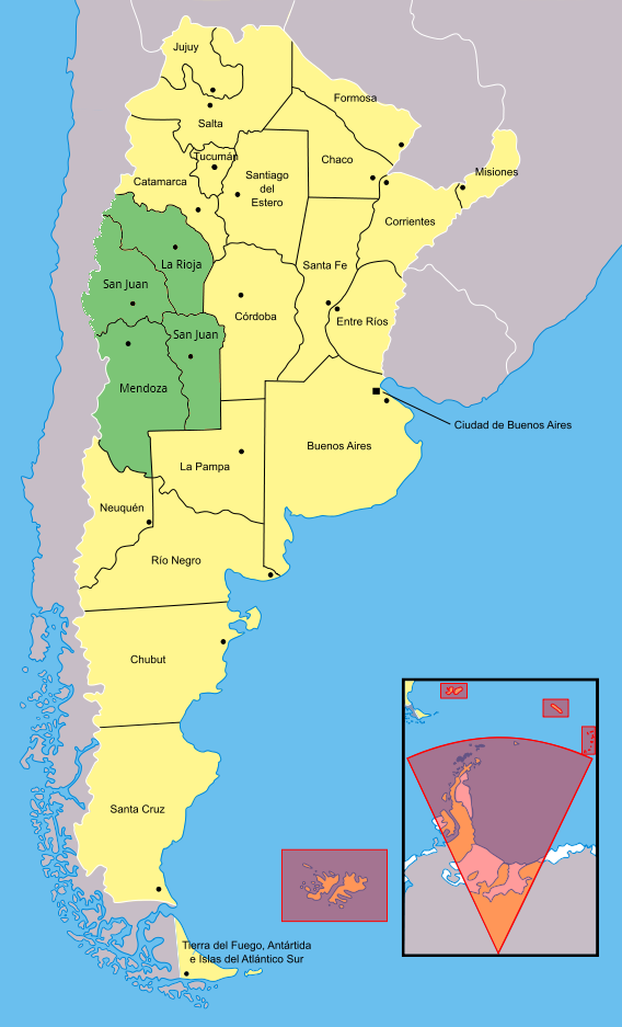 Este es un mapa que abarca toda la región del Nuevo Cuyo, esta región comprende a las provincias de Mendoza, San Juan, San Luis y La Rioja